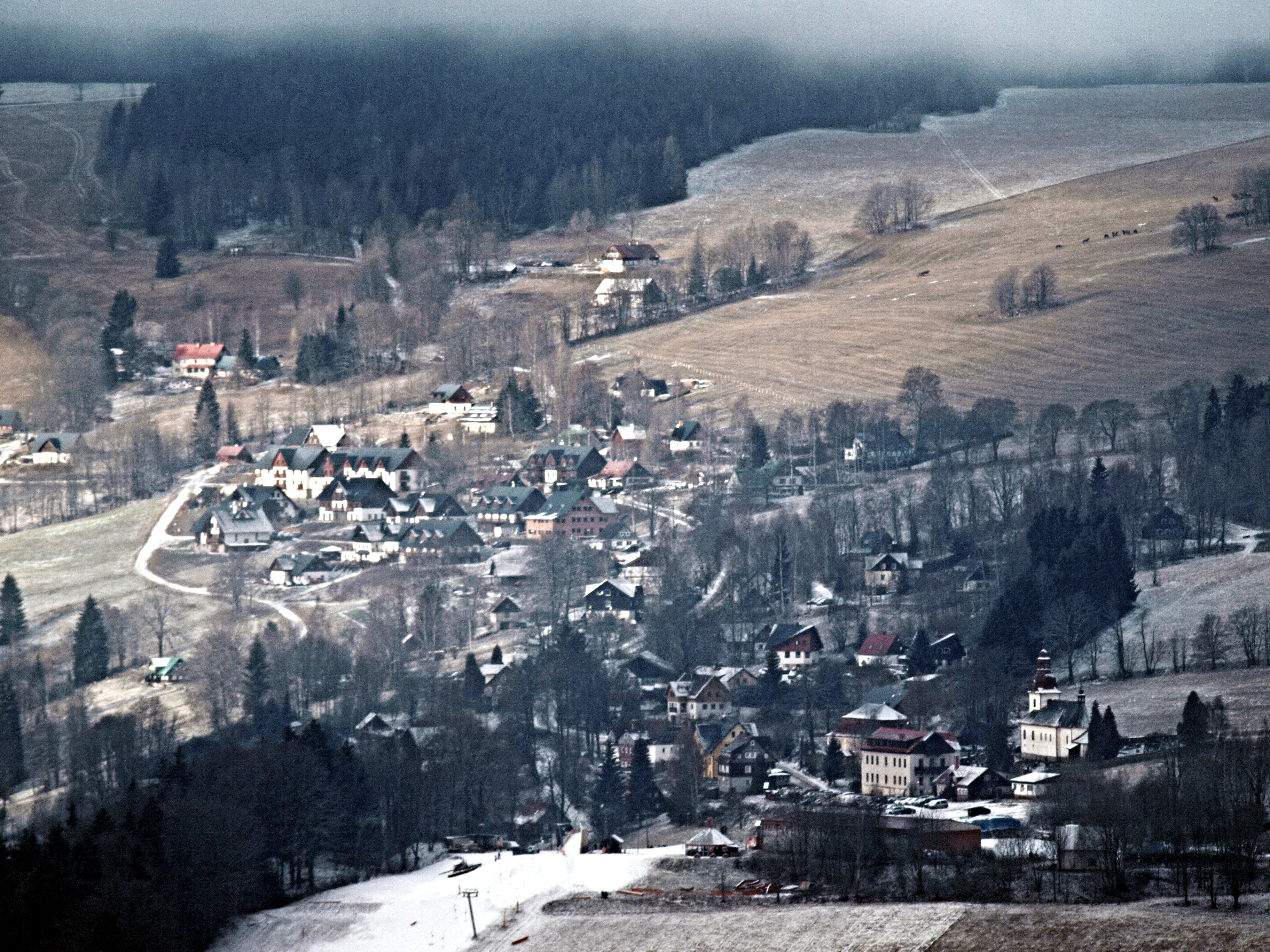 Vítkovice v Krkonoších